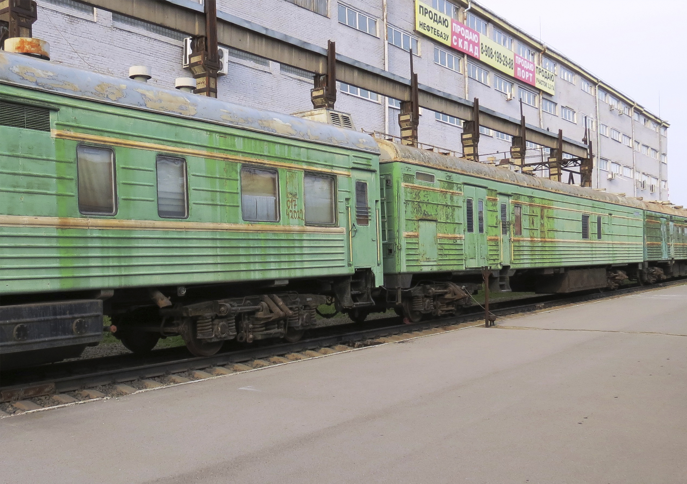 Радиокомплекс, состоящий из трех вагонов: вагон-студия, вагон-передатчик, вагон дизель-электростанция был построен на заводе «КОМИНТЕРН» в г. Ленинград в 1983 году